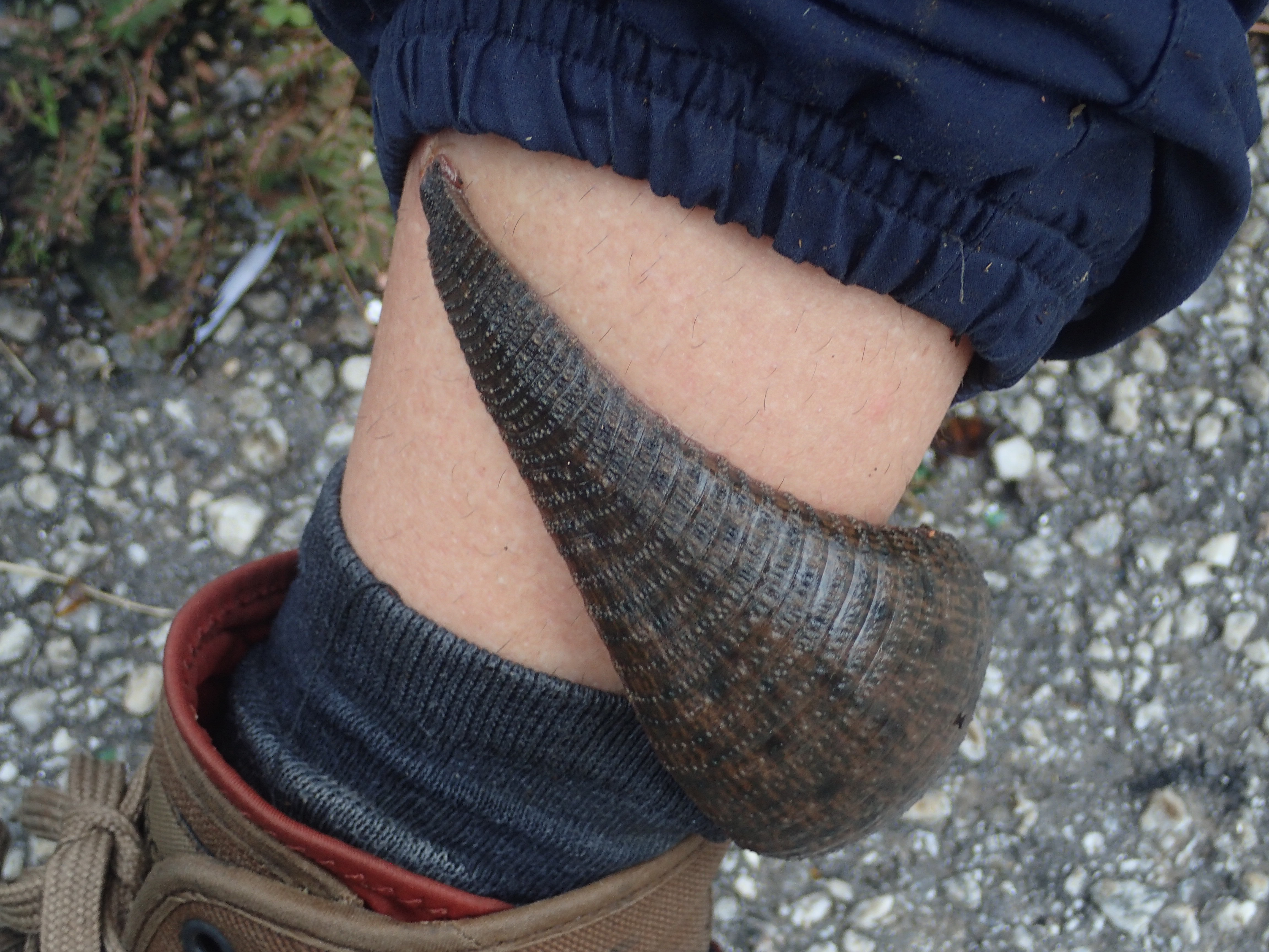 Sangsue géante d'Amazonie (Haementeria ghilianii), provenant d'un marais de l'île de Cayenne (Guyane), en plein repas sur son hôte